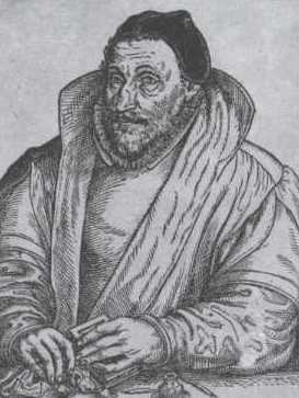 Bildnis des Greifswalder Professors Jacob Runge (1524–1595)